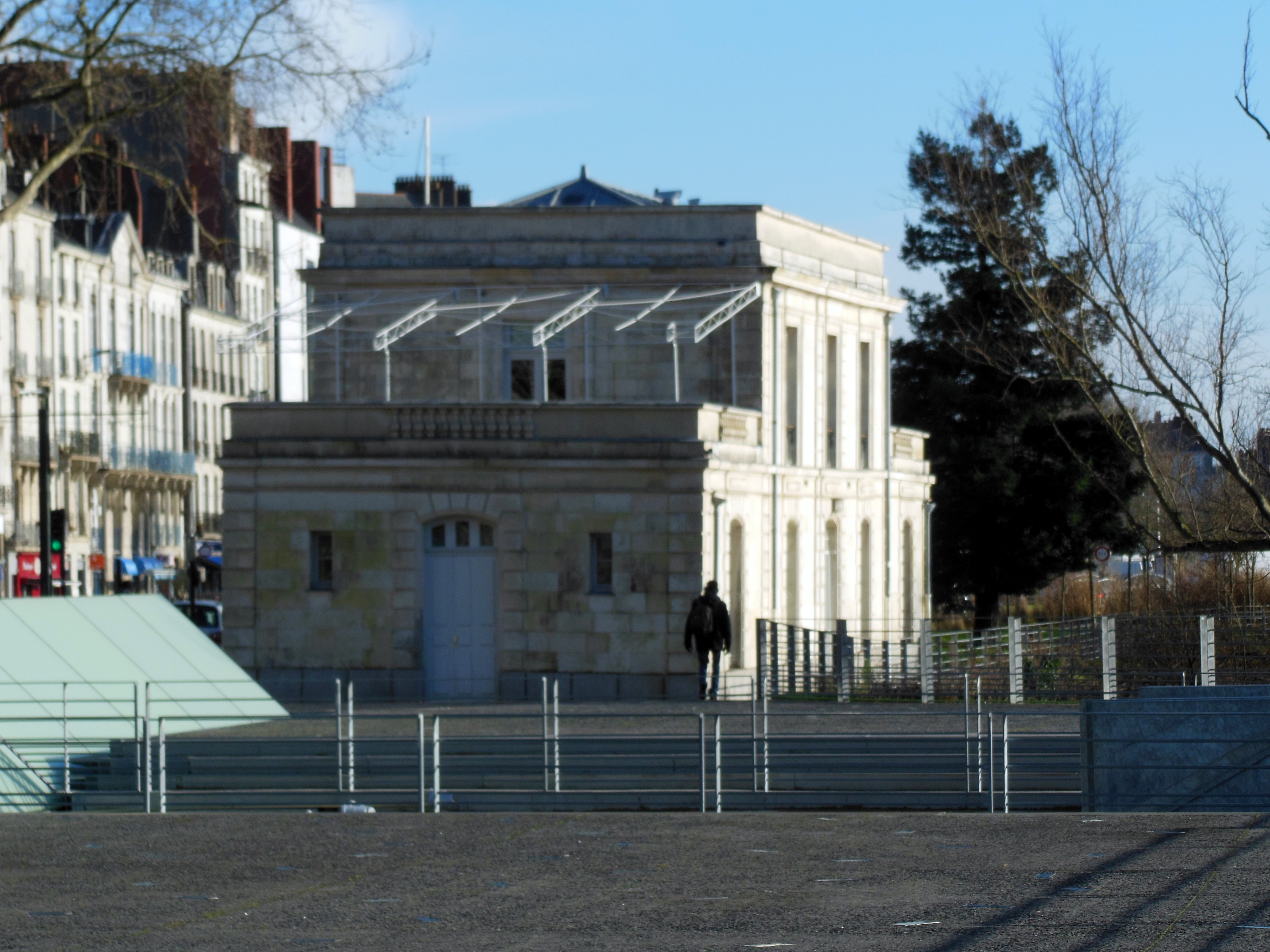 Maison de la mer, Nantes, France